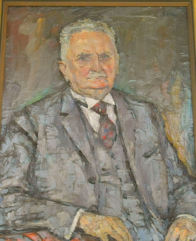 Porträt-Gemälde von Kurt Jannott im Deutschen Versicherungsmuseum in Gotha